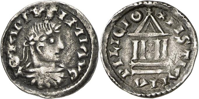 Denier au buste de Lothaire Ier frappé vers 833 probablement à Aix-la-Chapelle (Allemagne). Avers : LOTARIVS IMIAVC buste lauré et drapé à droite. Revers : XPISTIANA RILIGIO temple élancé, surmonté d’une croisette.